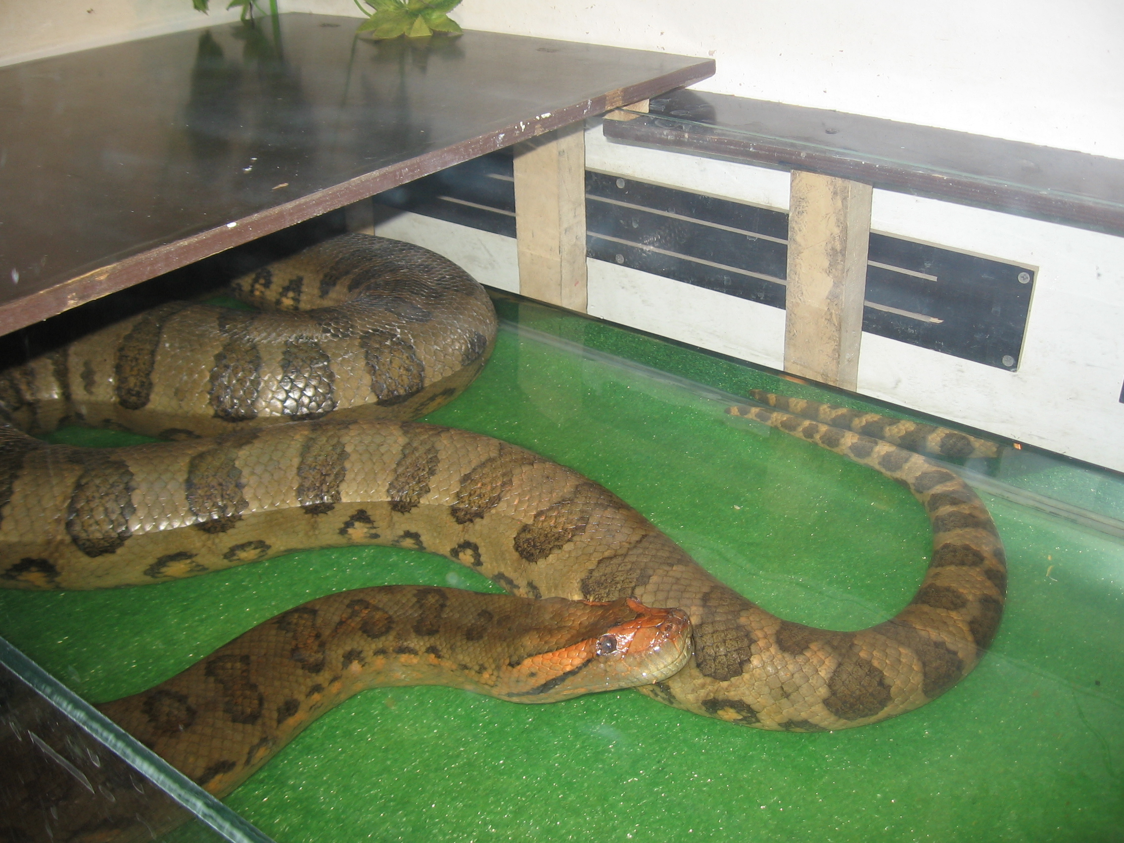 анаконда